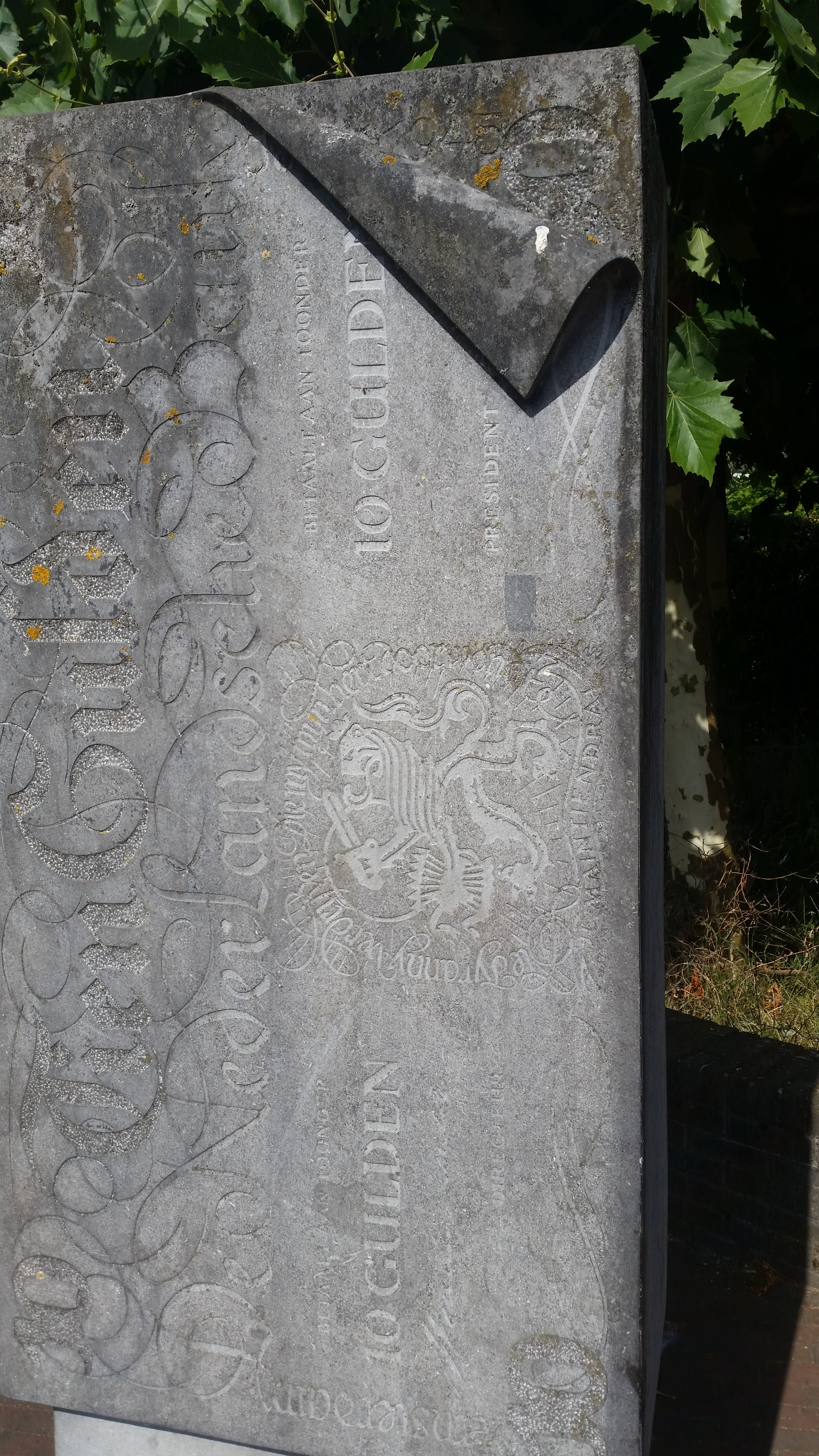 Beeld Tientje van Lieftinck aan de Dorpsstraat, Muiderberg